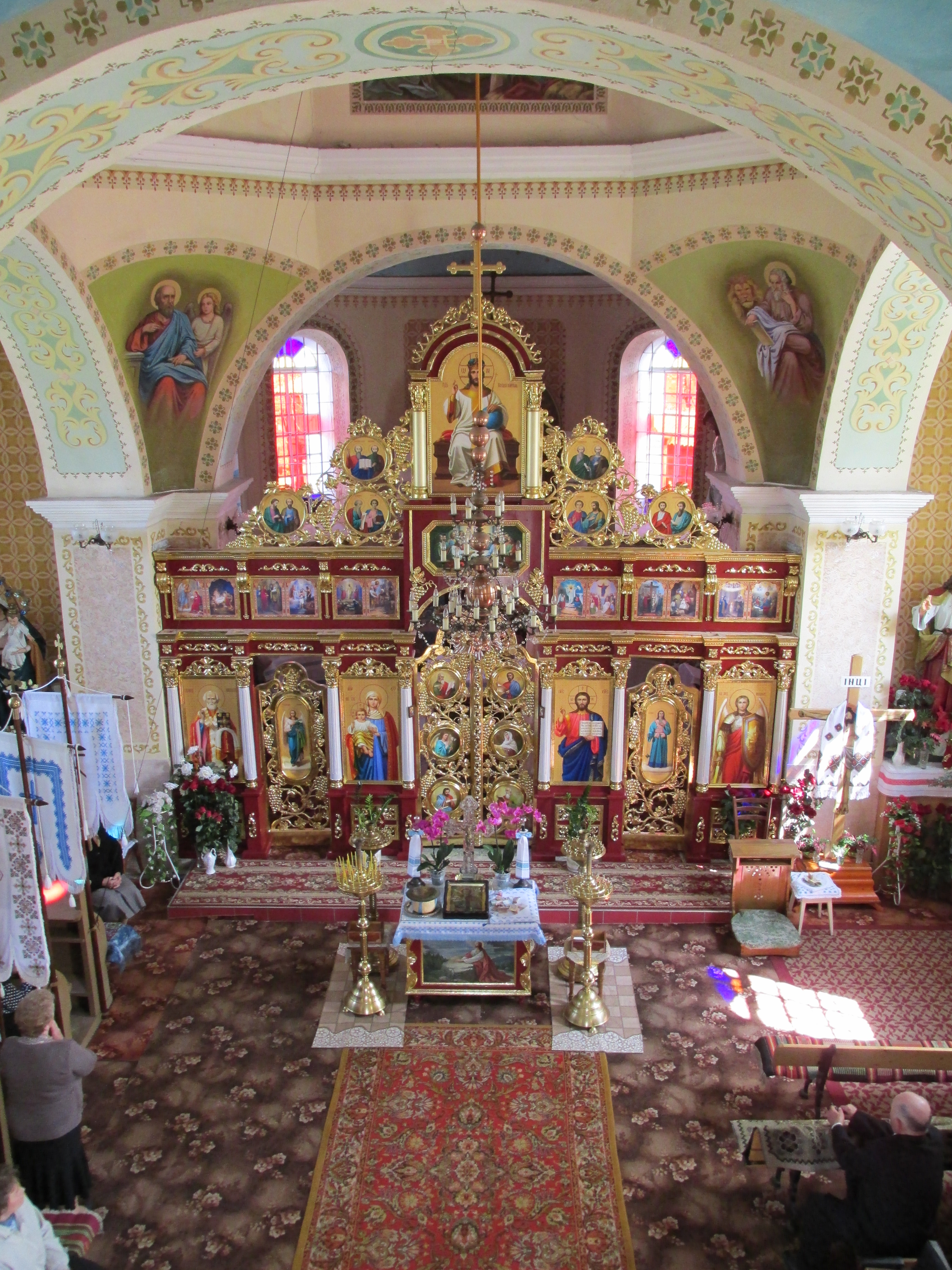 Церква святого Архістратига Михаїла в Бучачі. Іконостас